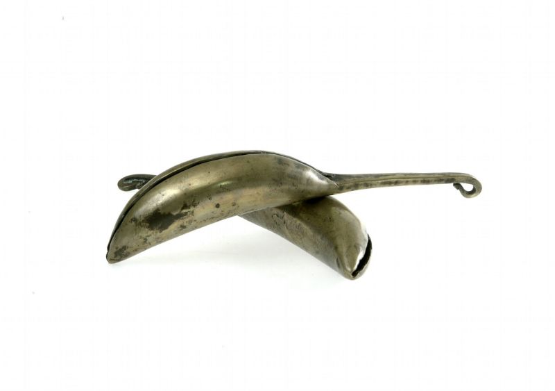 Slaginstrument. Oud Javaans banaanvormig hol slagbekken met midden over de bolle kant een spleet. De rug van een kemanak wordt tegen de gespleten bolle kant van de ander getikt. Het is geen algemeen gebruikt instrument.. Bekken van messing Unknown language: Kemanak